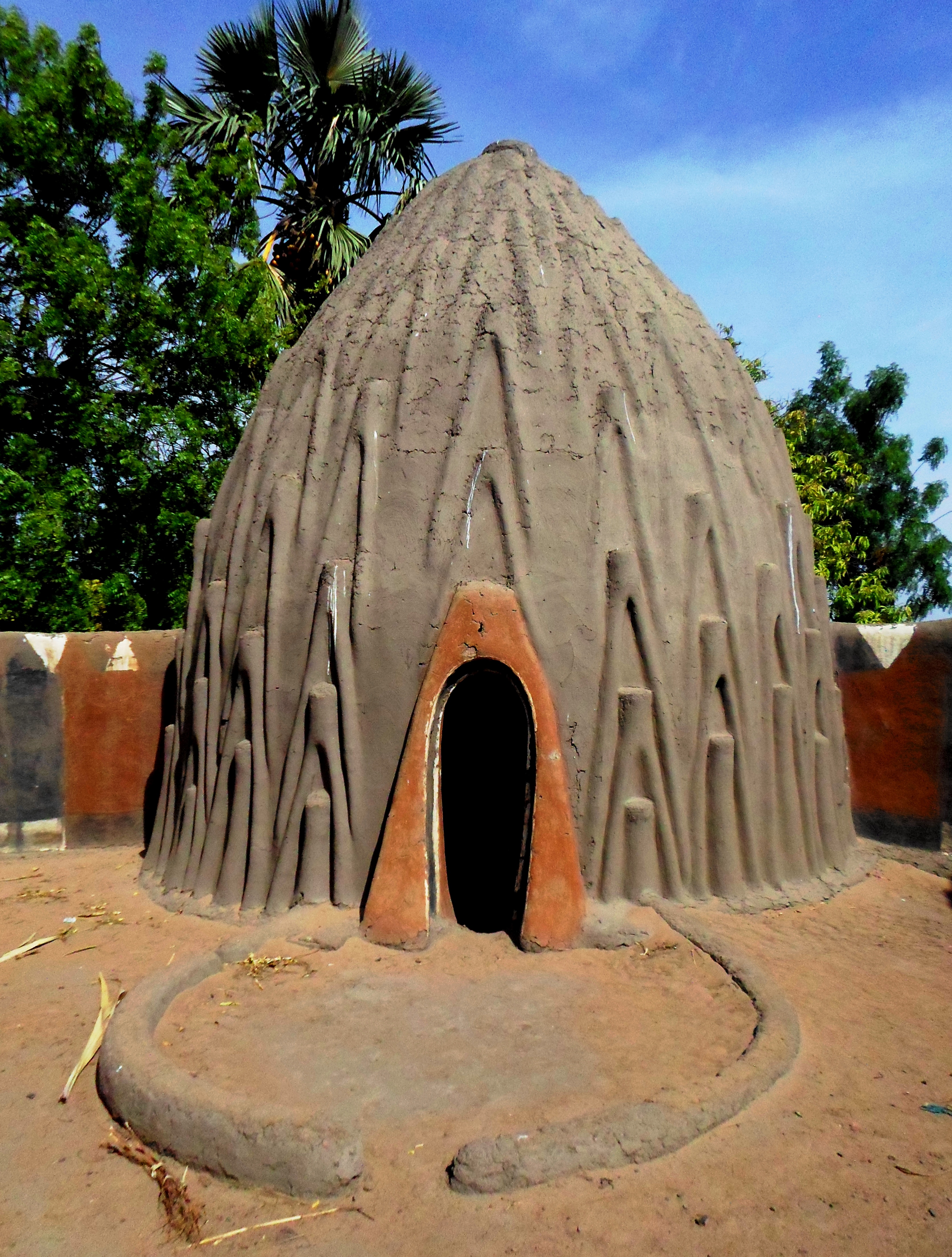 Cases traditionnelles du Peuple Mousgoum dans le Mayo-Danay. À Mourla (MAGA)